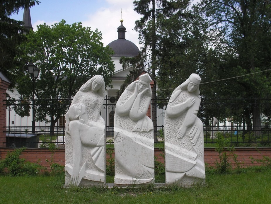 Людмила Мисько «Плач над героєм Батурина», 2008, вапняк, 230х270х50 см, Батурин, Україна